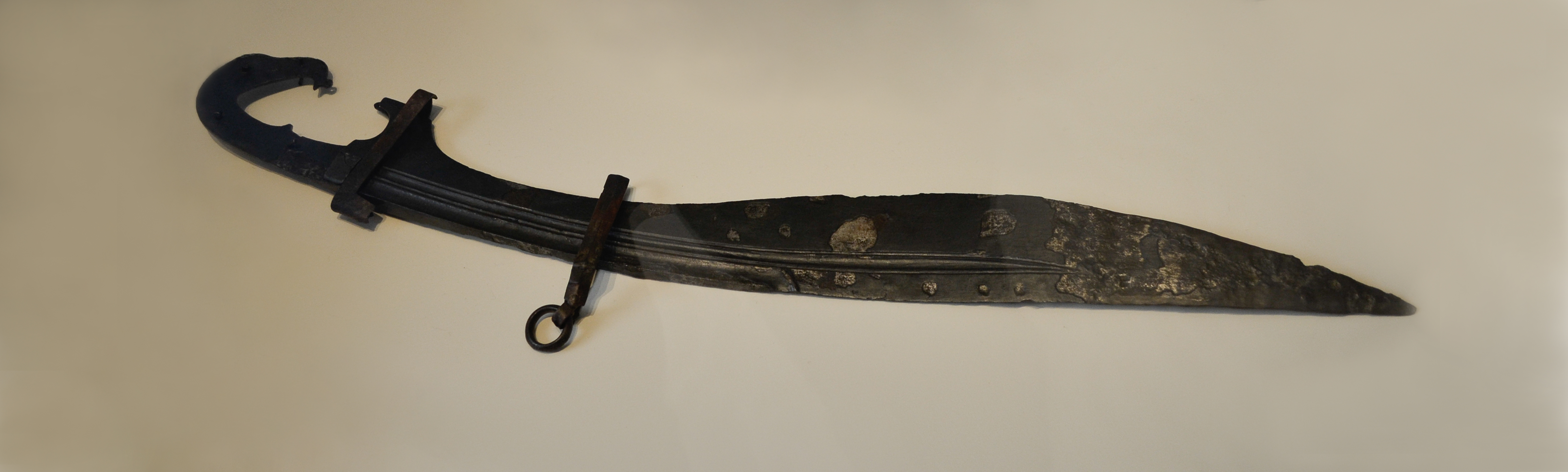 Falcata con empuñadura sin revestimiento y forma de cabeza de animal (ave). Hoja curva de hierro forjado. Conserva tres abrazaderas de la vaina. Tipo A (ave) de Quesada. Final del siglo V a. C.- principio del siglo III a. C. Nº inv. 10468. Museo Arqueológico Nacional de España. Longitud: 57 cm. Abrazadera: Longitud máxima : 9 cm; anchura máxima: 2,50 cm. Anilla: Diámetro: 2,50 cm. Embocadura de vaina: Altura: 2,50 cm; longitud: 7,70 cm; anchura:1,80 cm. Empuñadura de falcata: Longitud: 10,60 cm; grosor: 0,50 cm; anchura máxima: 7 cm; anchura mínima: 2,70 cm. Guarda de la empuñadura: Longitud:5,80 cm; grosor: 2 cm. Hoja de falcata: Longitud: 46,50 cm; grosor máximo: 0,75 cm; grosor mínimo: 0,15 cm; anchura máxima: 5,60 cm; anchura mínima : 3,50 cm. Remache: Longitud: 2,30 cm.